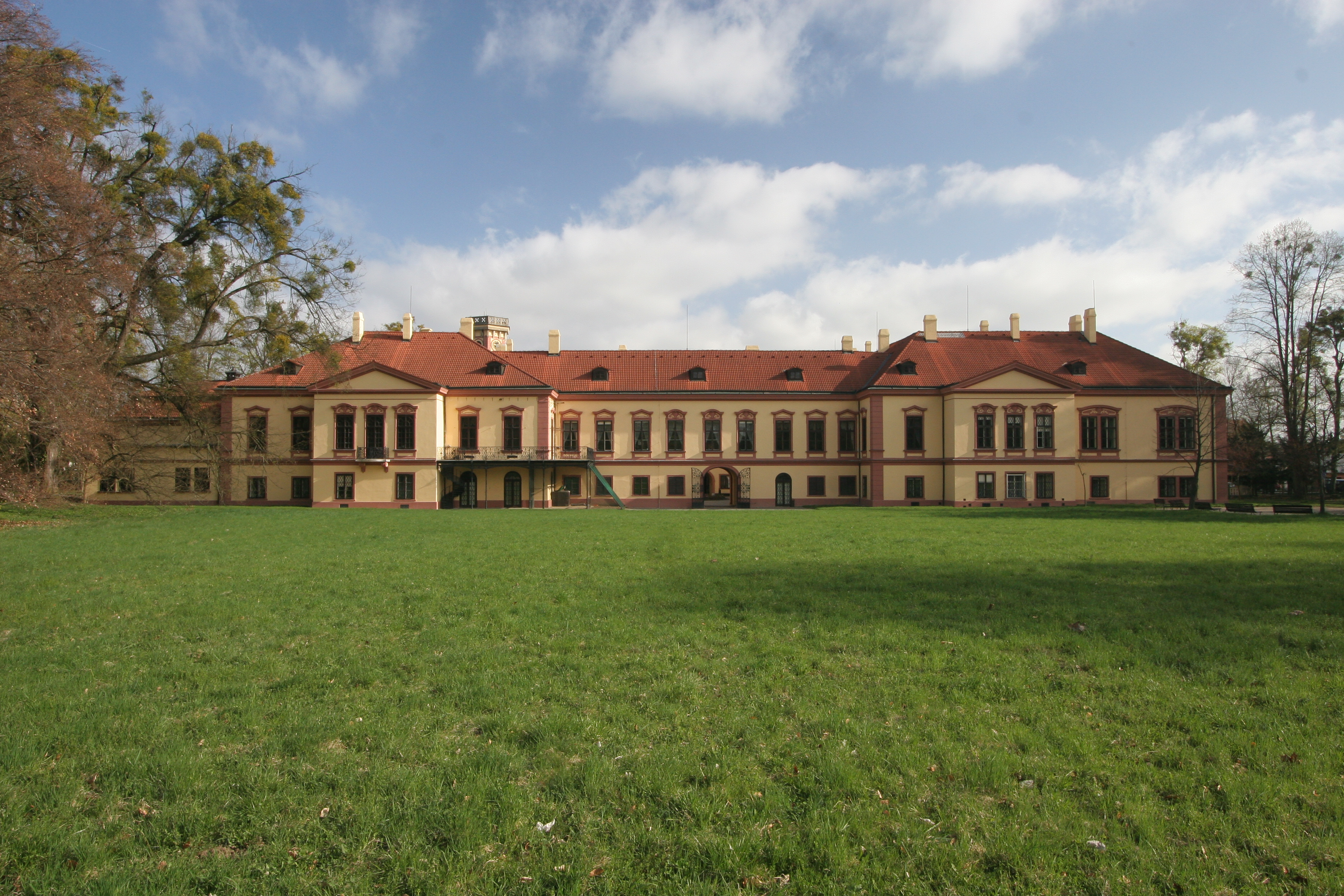 Zámek v Heřmanově Městci z parku